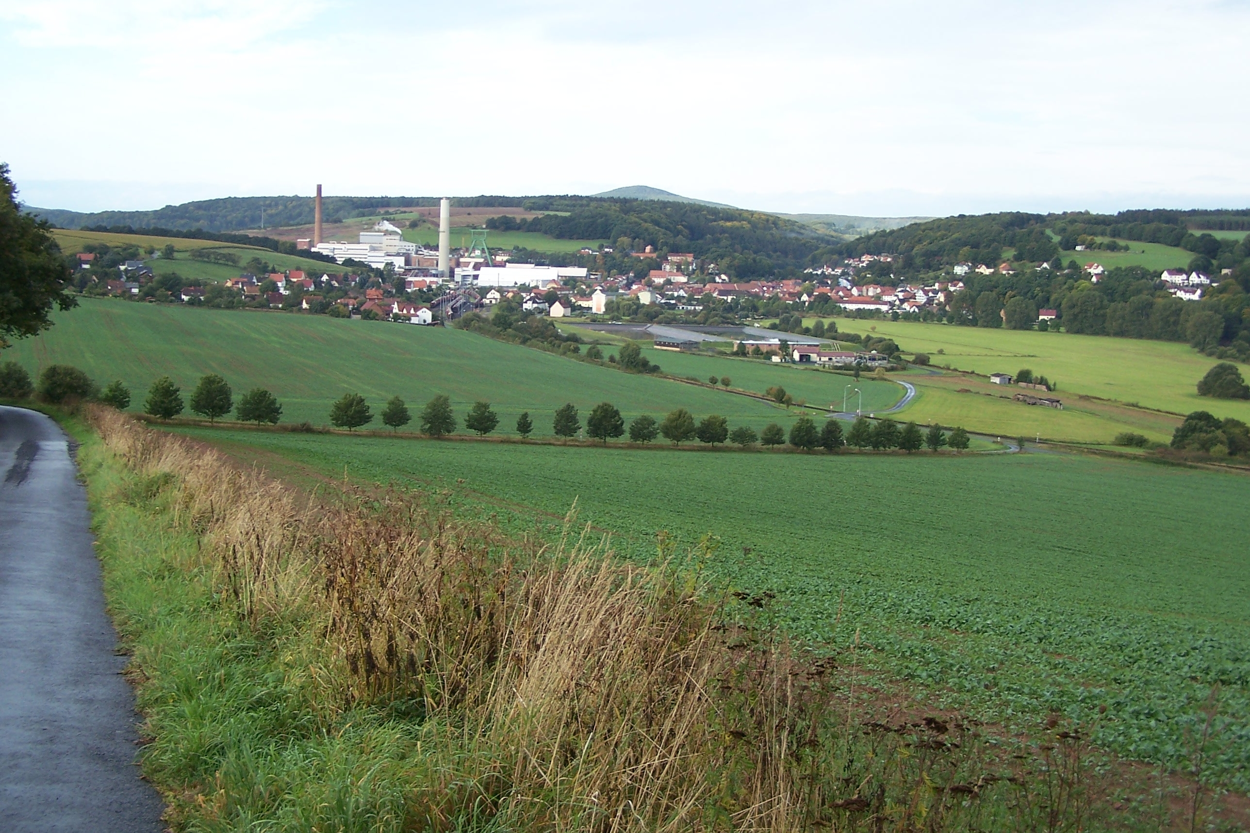 Blick von Norden auf Unterbreizbach.